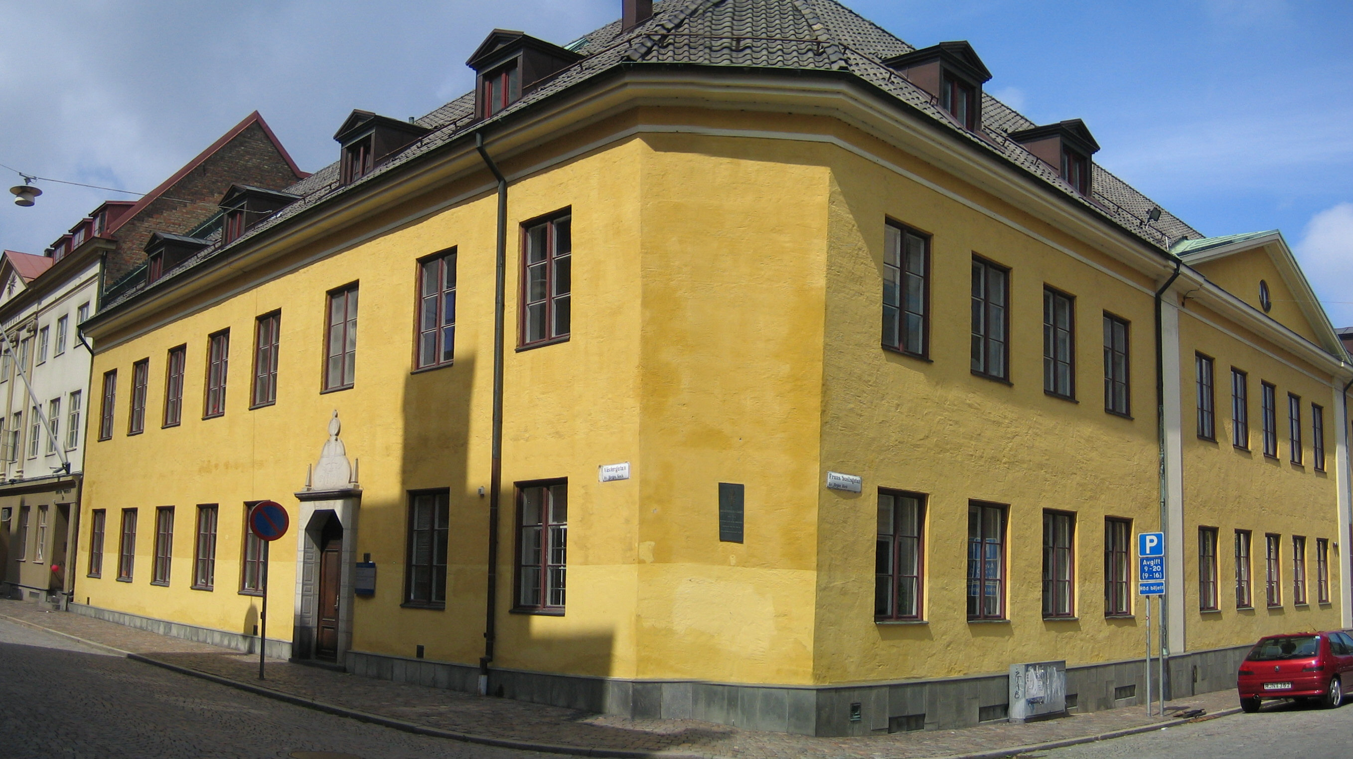 Dringenbergska gården, Malmö, Sweden